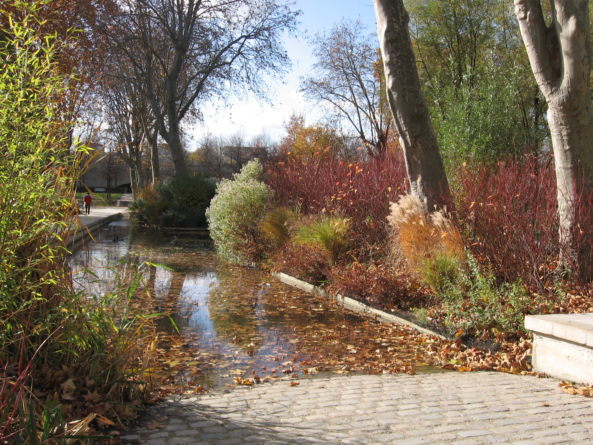 Parc de Bercy - Automne 2007